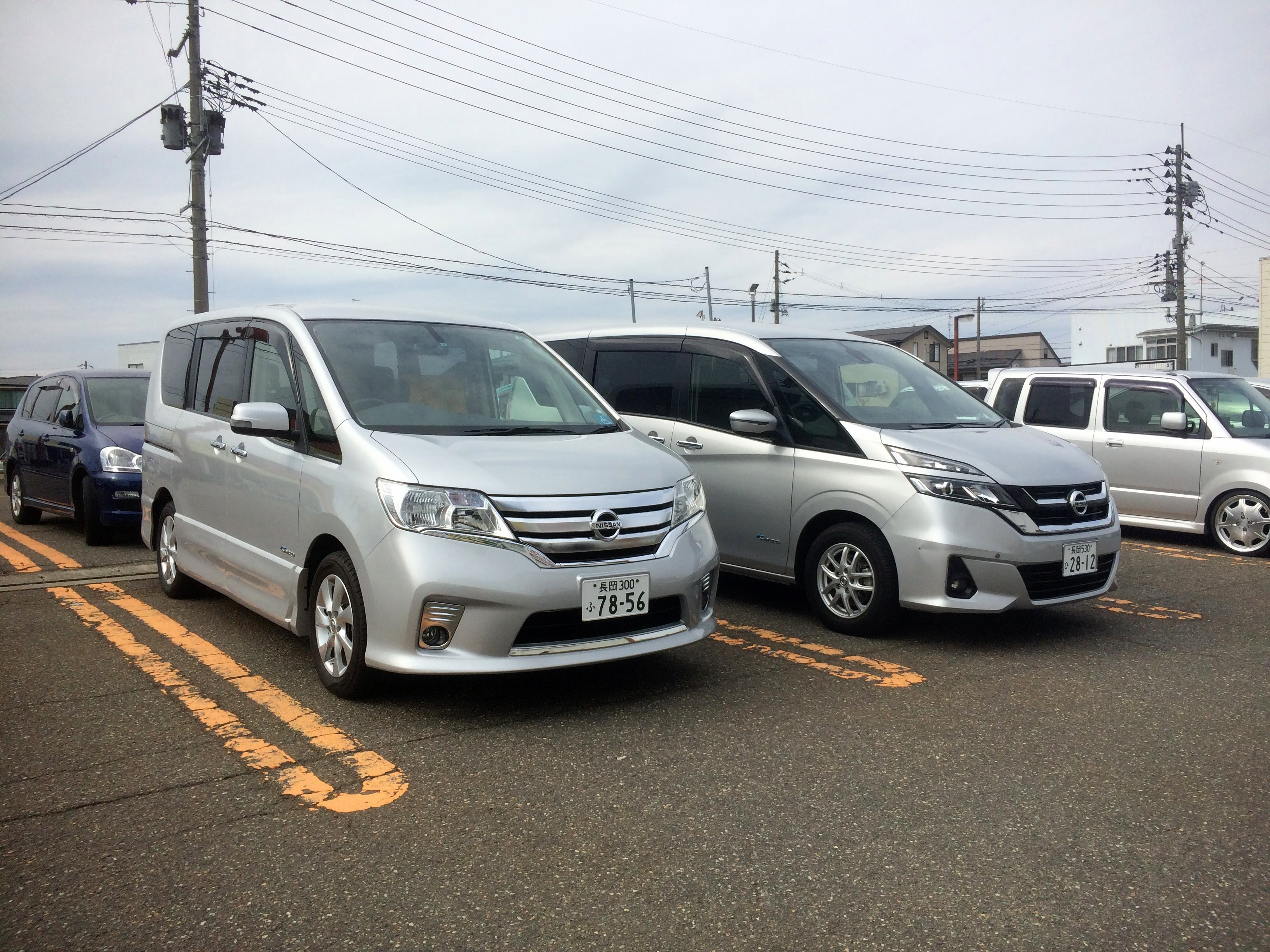 日産セレナ4代目と5代目